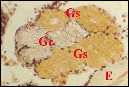 Glandes de deux types dans la gnathocoxa mâle de Kaira alba